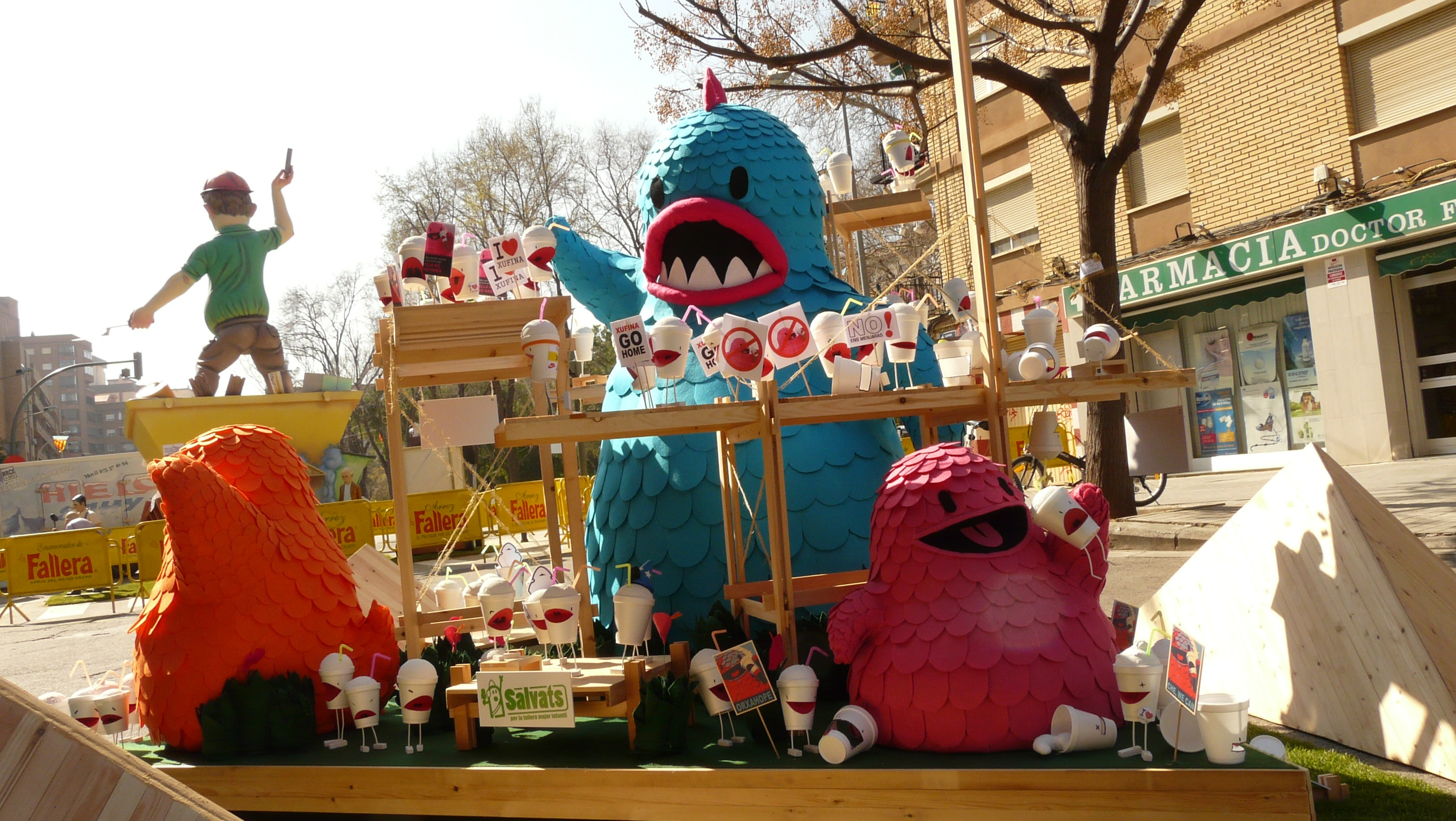 Amb xufina!